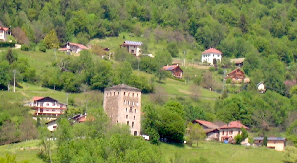 Tour du Treuil à Allevard, France.